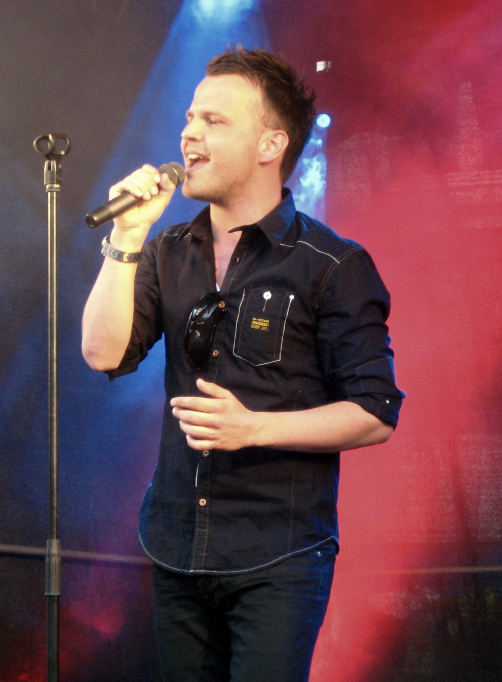 Bryan Rice i Hjørring